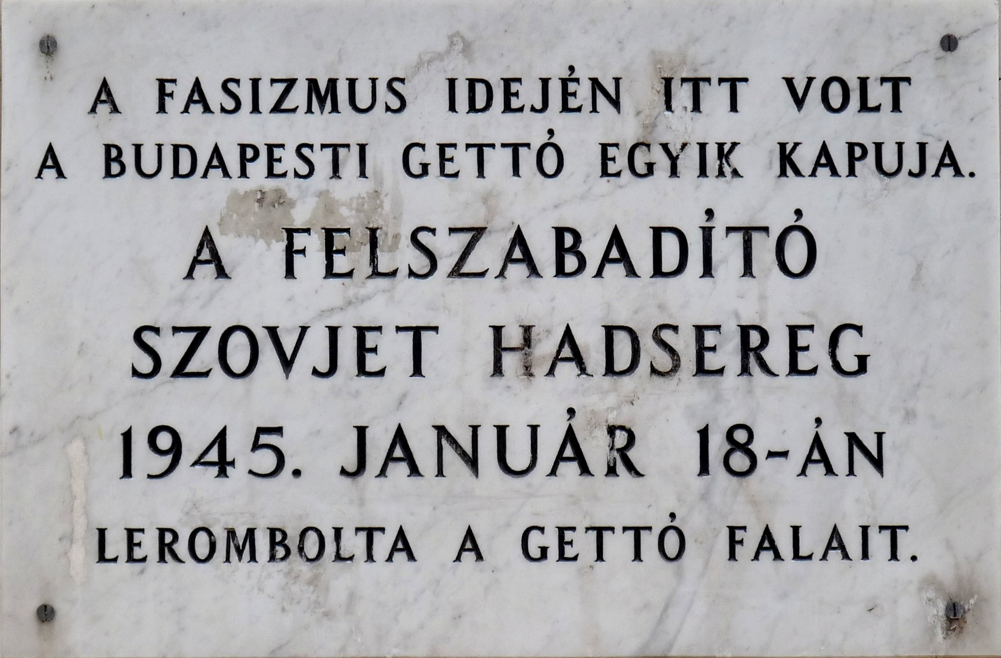 A volt zsidó gettó kapujának helyére emlékező tábla a Dohány utcai zsinagóga épületegyütteséhez tartozó Hősök Temploma árkádsorának egyik oszlopán. Budapest, VII. ker. Wesselényi utca 3.